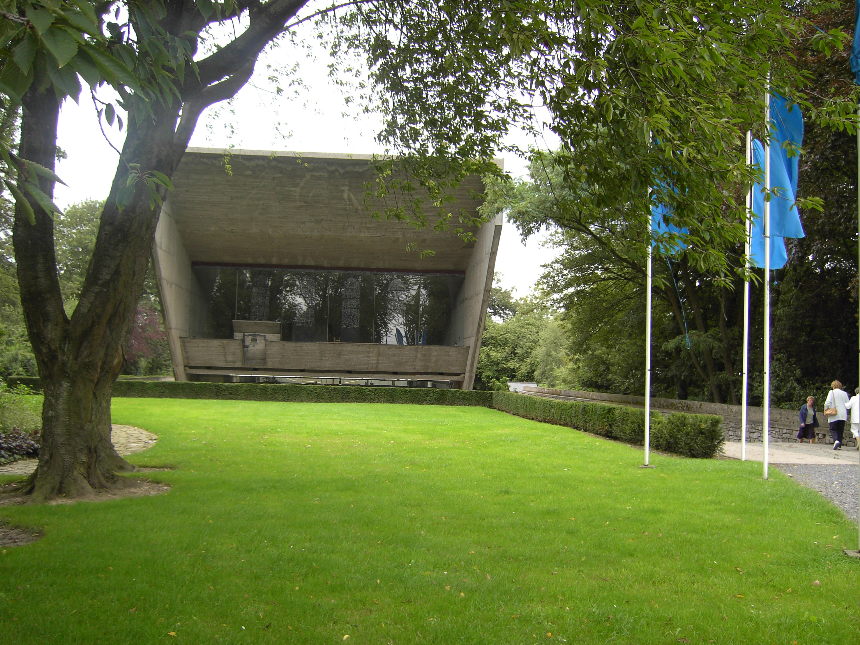 Kerk van Kerselare - Oudenaarde